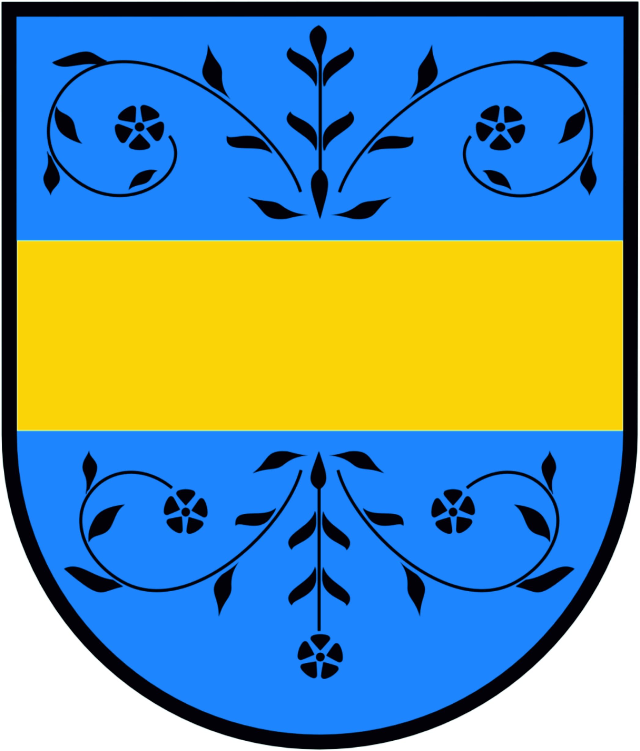 Herb Węgorzyna przedstawia w błękitnym polu herbowym ozdobny motyw roślinny barwy czarnej (damaskinaż renesansowy), w połowie wysokości tarcza przedzielona jest poziomym pasem barwy złotej.